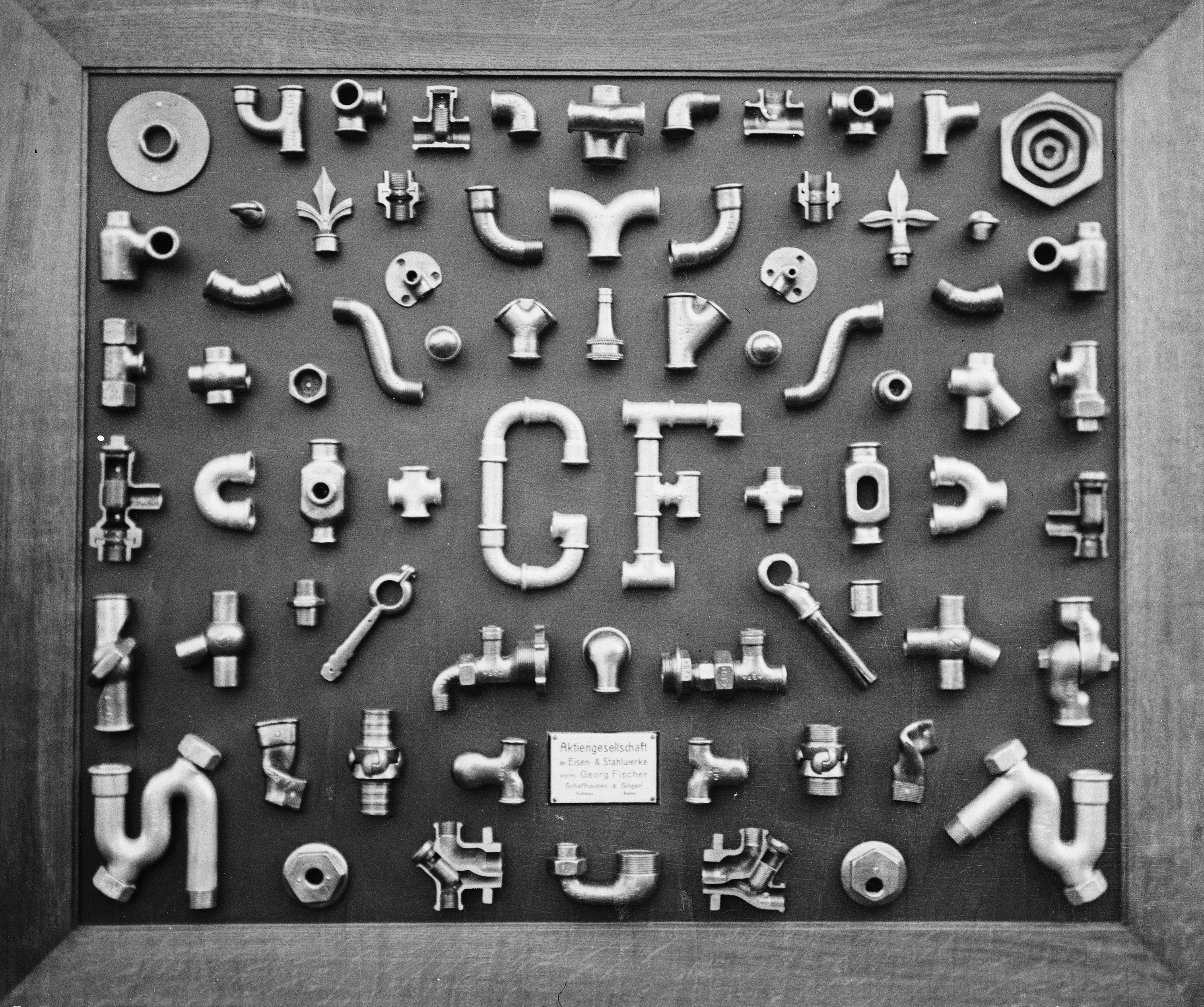 Mustertafel verschiedene Rohrverbindungen; Fittingstableau